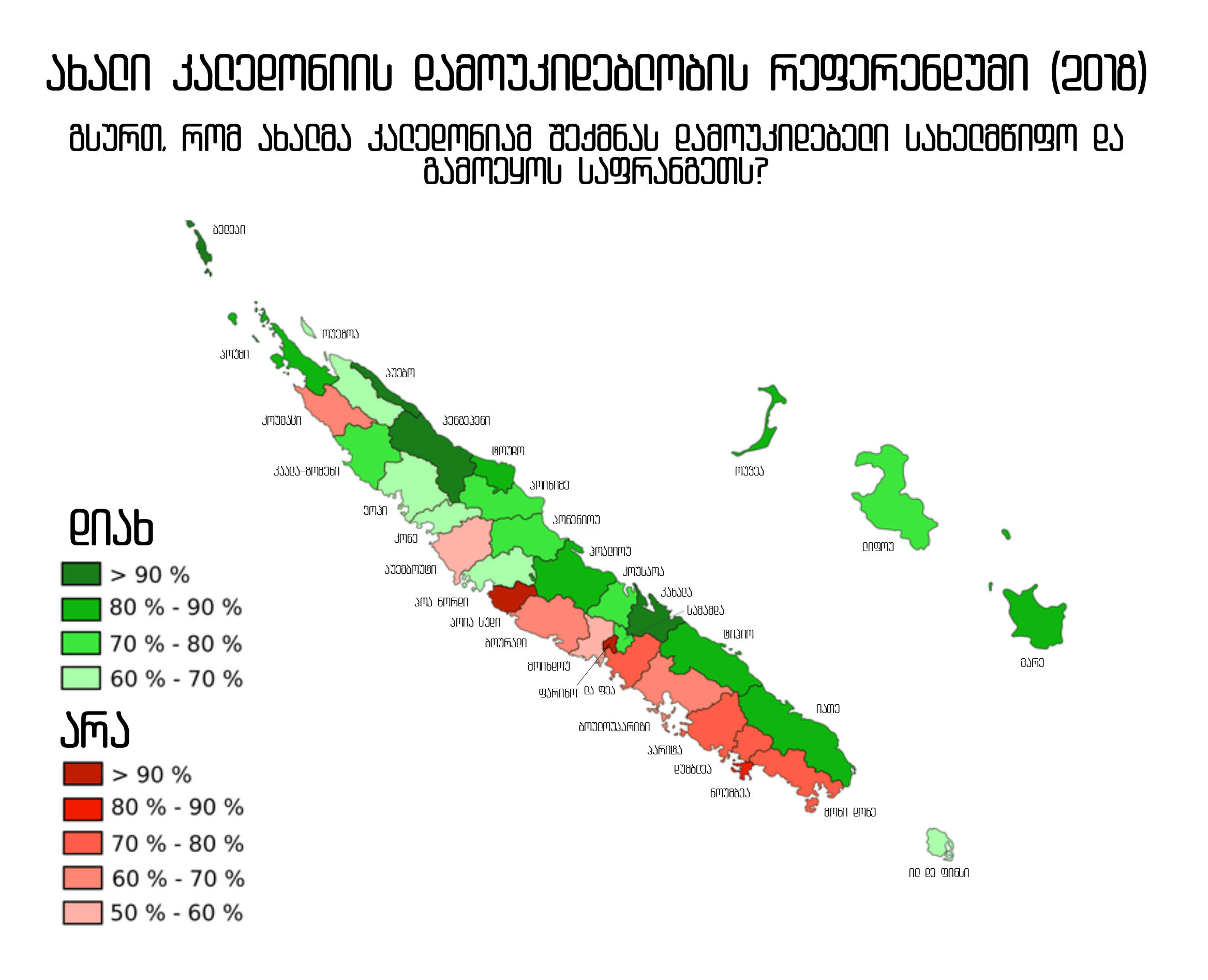 რეფერენდუმის შედეგები რუკის მიხედვით